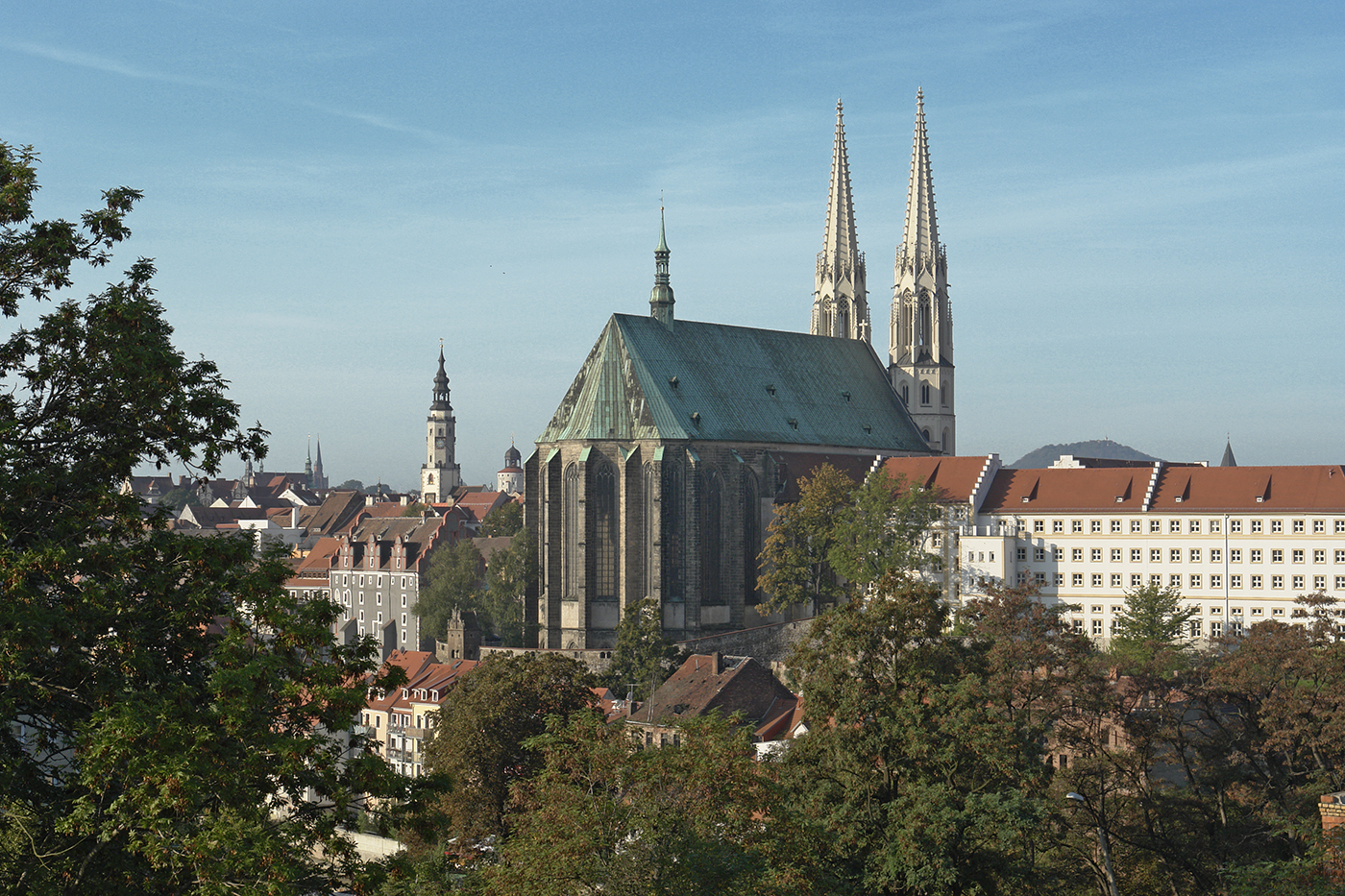 Goerlitz, Stadtansicht Peterskirche mit Vogsthof im Hintergrund die Landeskrone (Berg)